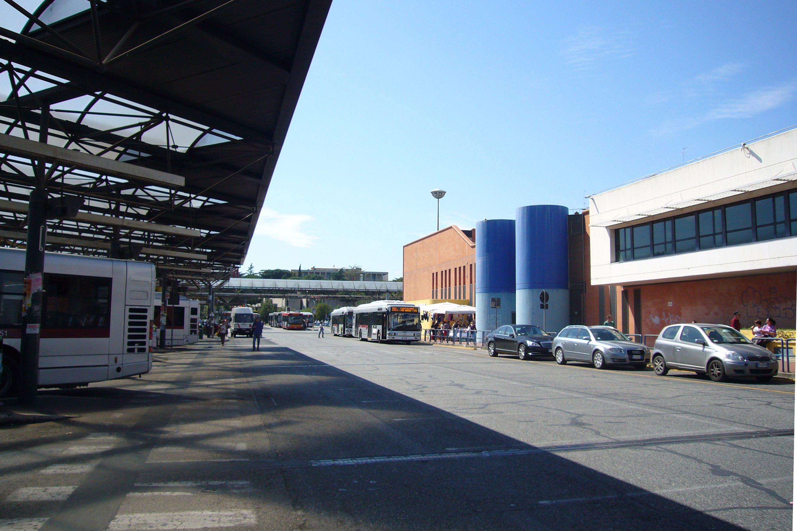 Roma, stazione bus extraurbani alla stazione Metro B Laurentina